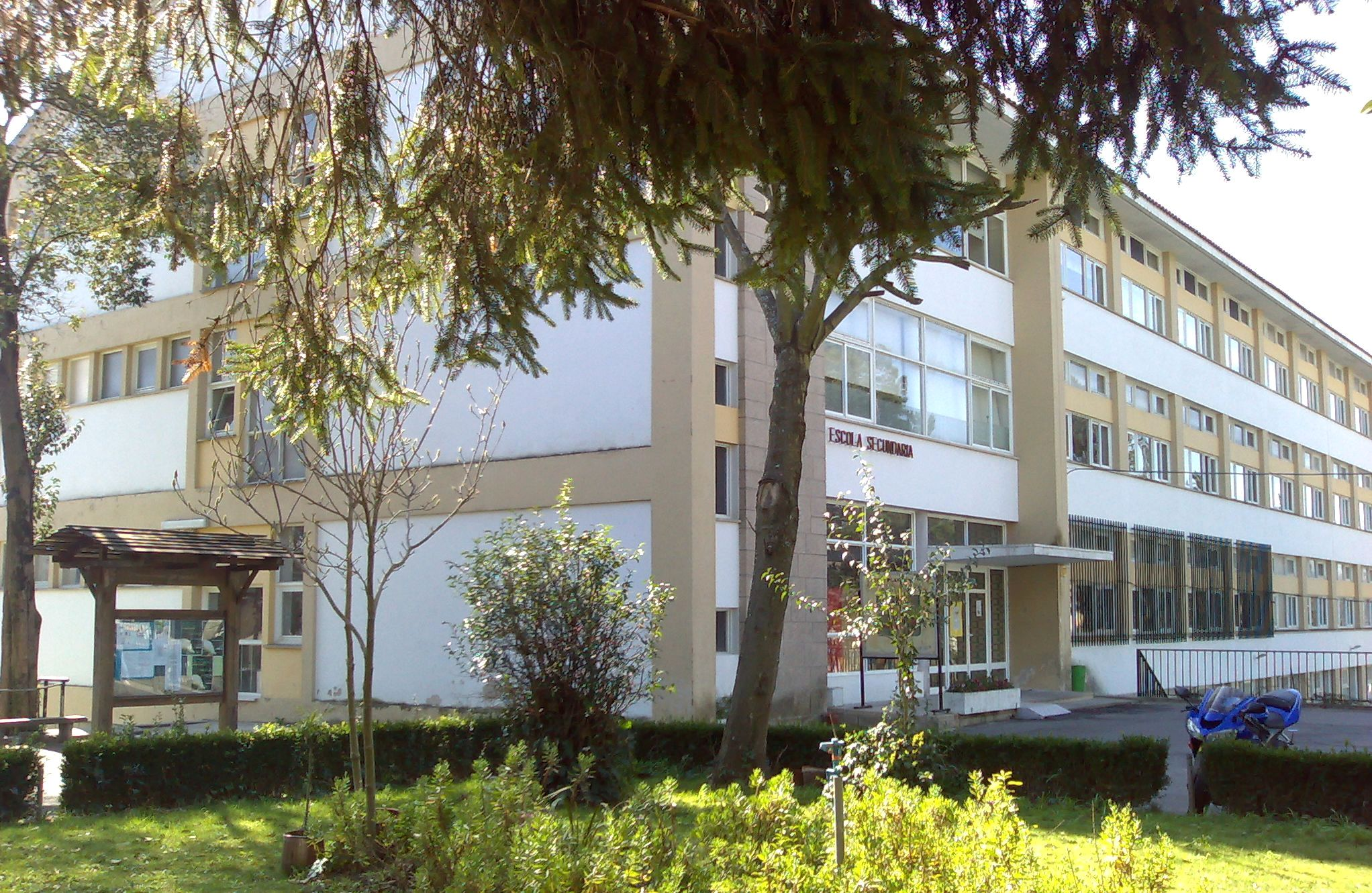 Vista nascente da Escola Secundária de Gondomar